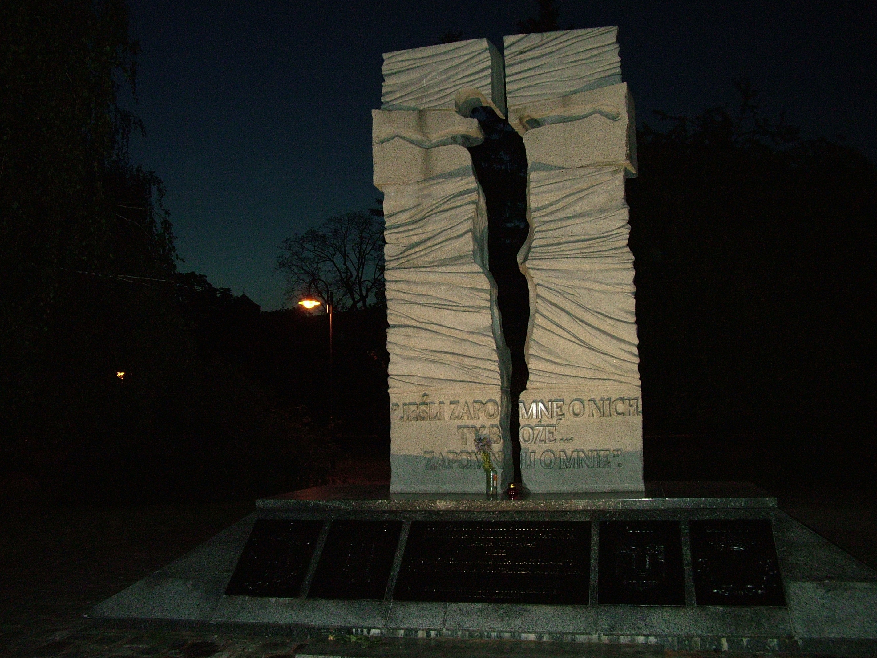 Pomnik Ofiar Rzezi Wołyńskiej we Wrocławiu